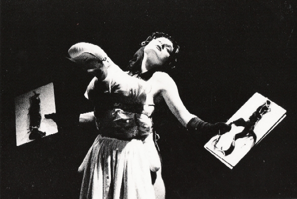 La Falsa Suicida (peça de teatro)